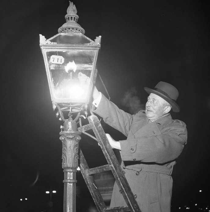 Gustav Adolf Hallqvist som tände sin sista lykta på Norrbro den 18 december 1953.